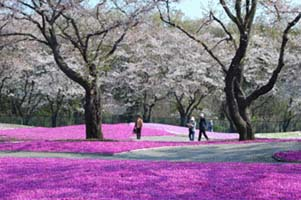 群馬県館林市「茂林寺前駅」下車、徒歩15分で行ける芝桜の名所。 【野鳥の森フラワーガーデン】